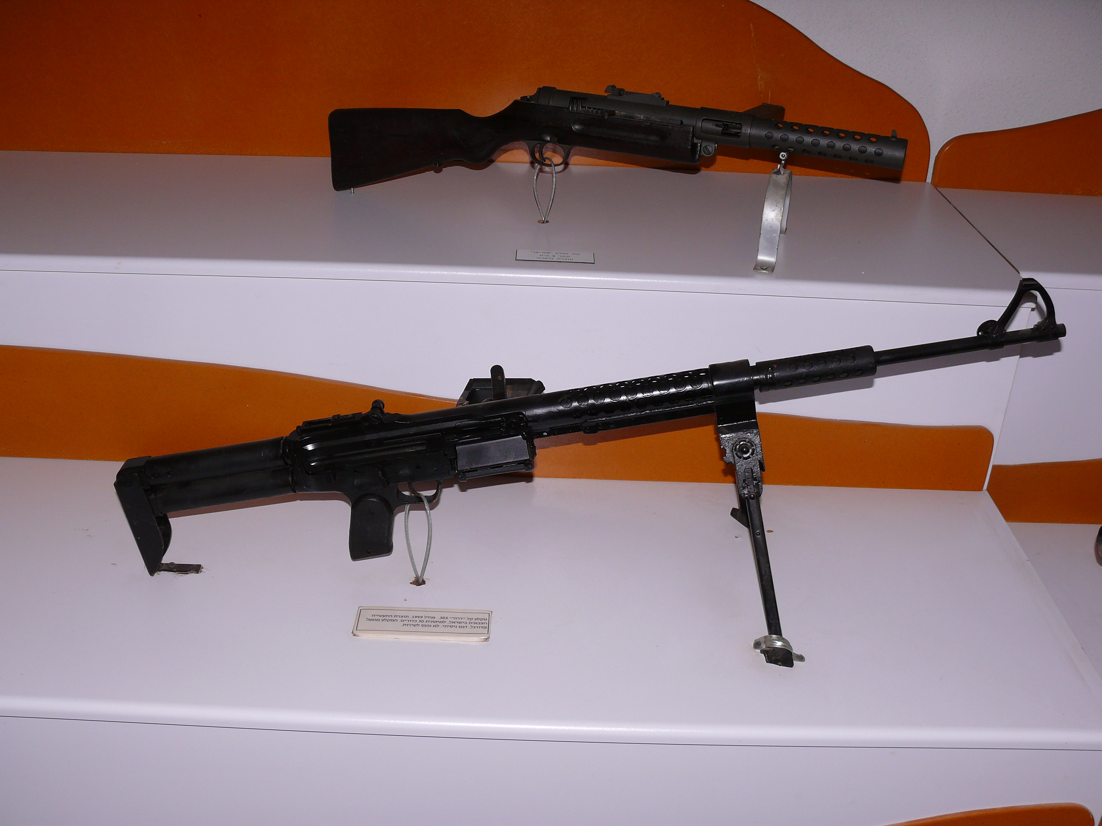 Dror machinegun, Israeli made LMG (front); MP28.2 (back) מקלע דרור, תוצרת ישראלי